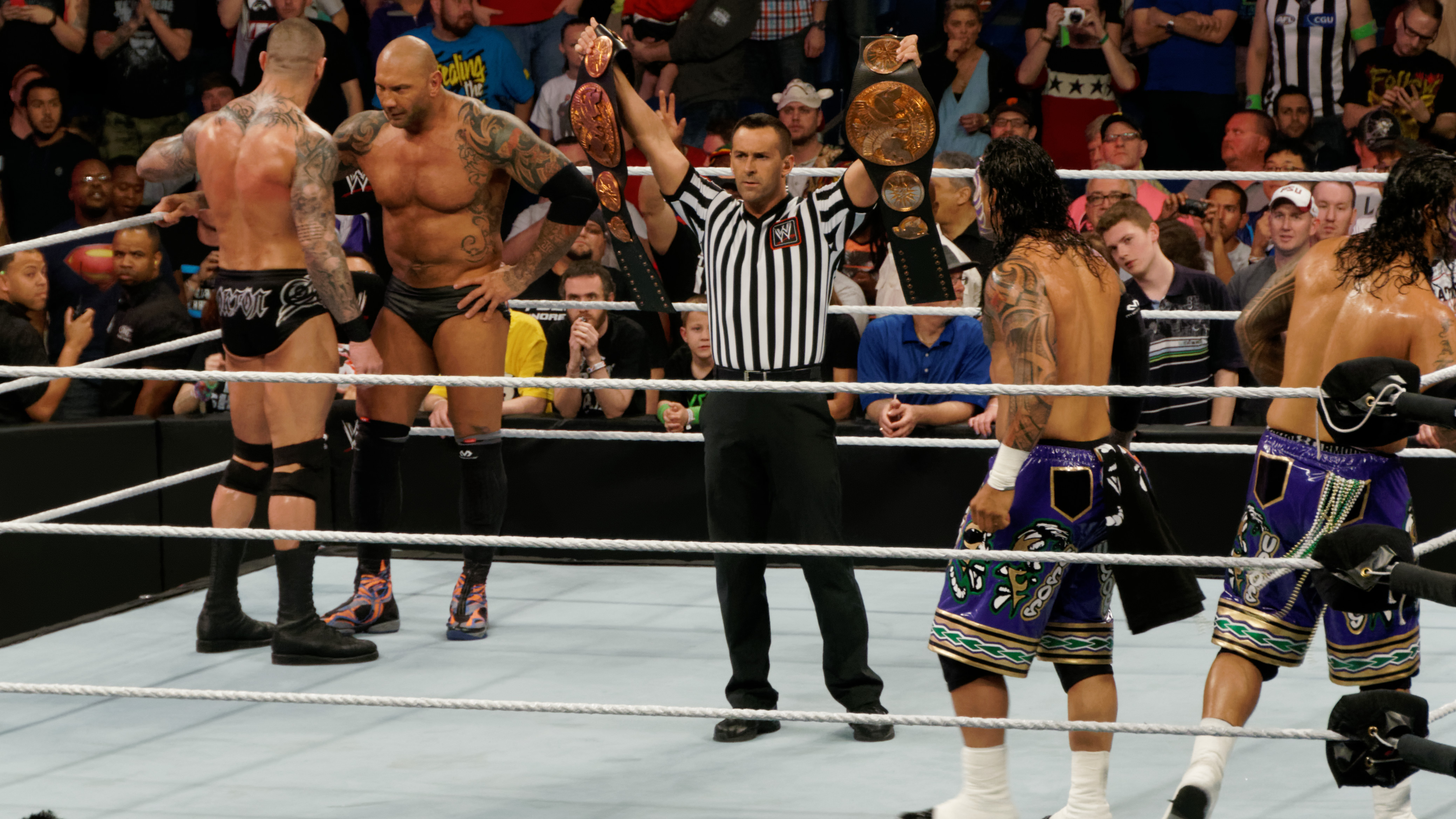 2014-04-07_20-19-44_NEX-6_1241_DxO